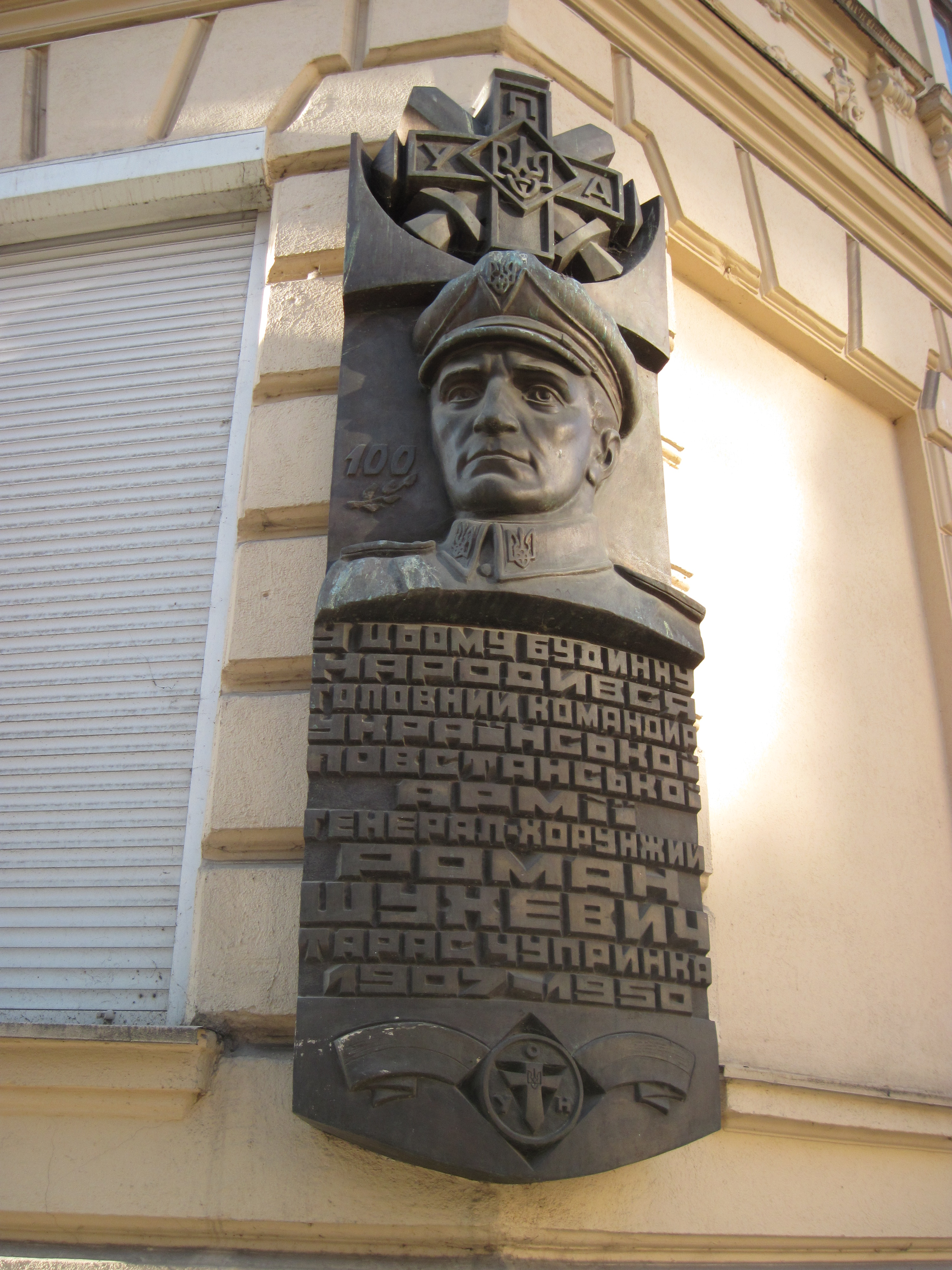 Роман Шухевич. Пам'ятна дошка, вулиці Кривоноса - Довбуша, Львів